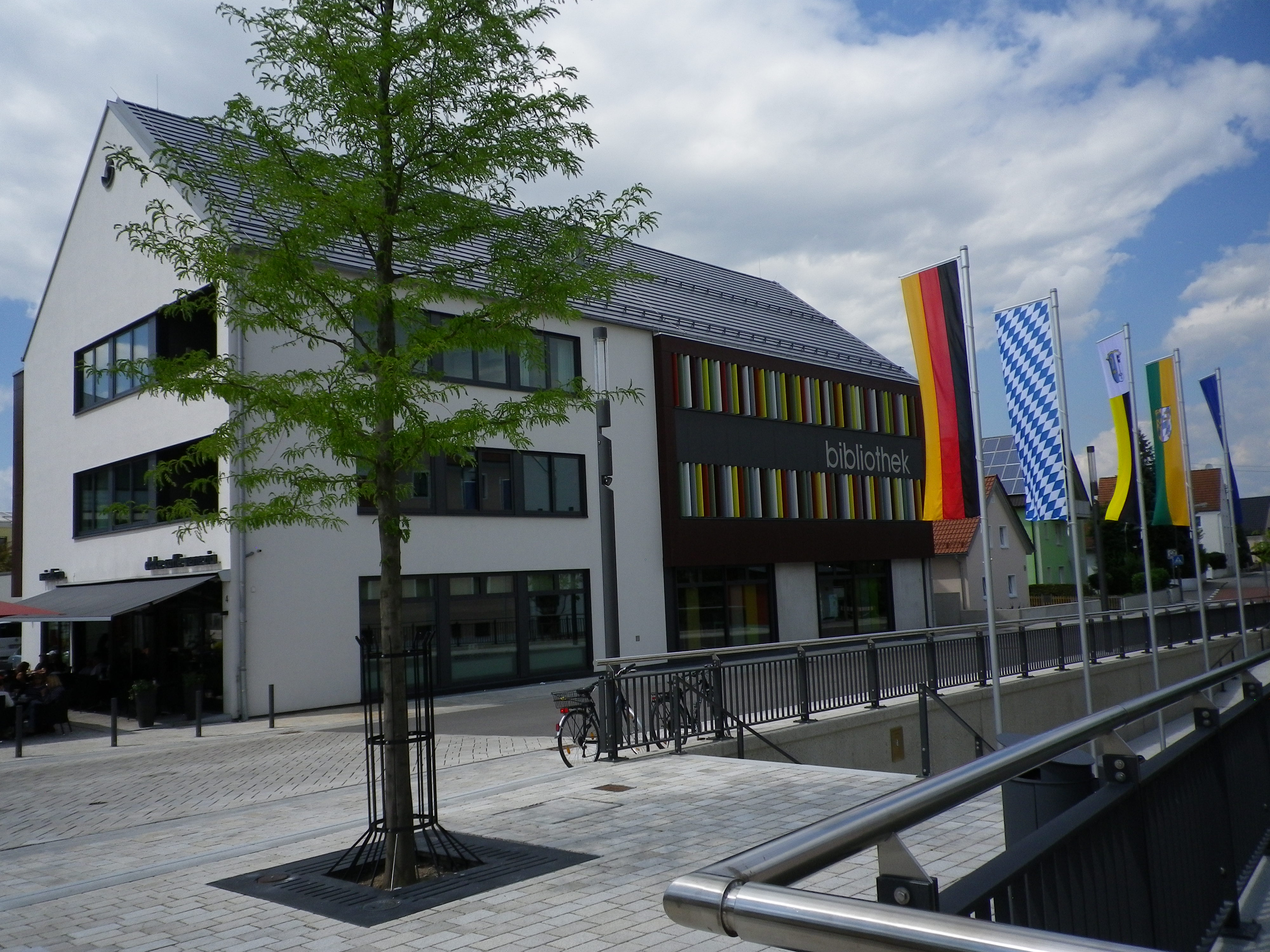 Zentrum von Manching